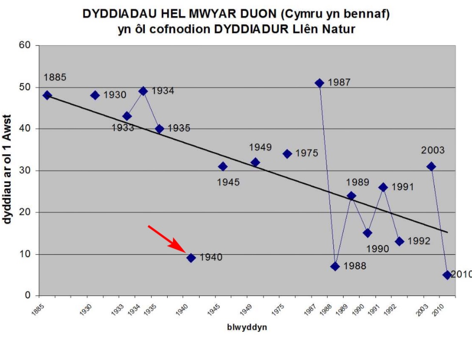 Newid dros amser yn y dyddiad cyntaf “hel mwyar duon” yng Nghymru’n bennaf